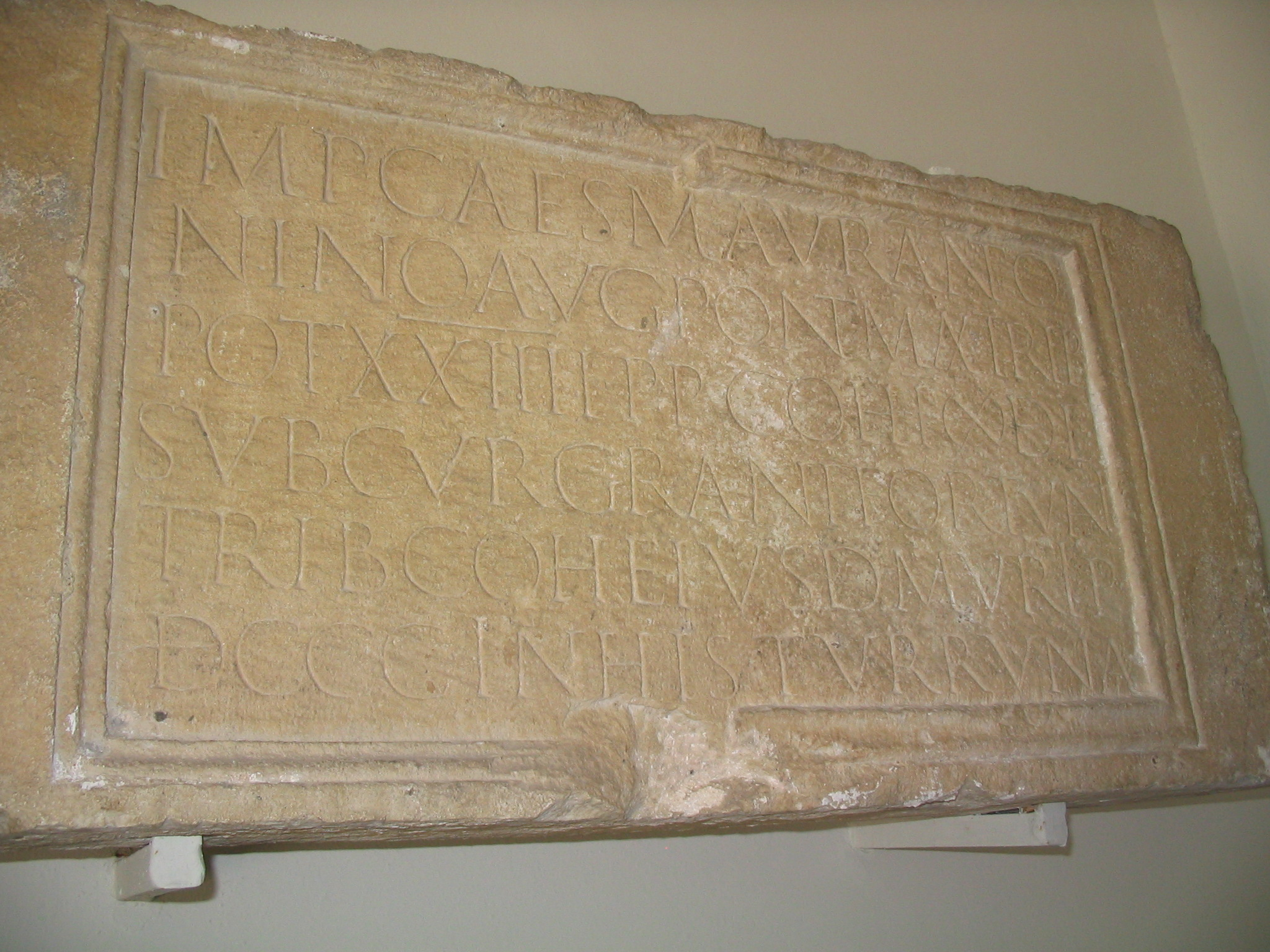 Inscription latine d'époque romaine retrouvée à Salona et conservée au musée de Split. Elle témoigne de l'érection de murailles pour la ville par des troupes de l'armée romaine durant le règne de Marc Aurèle. Les troupes appartenait ici à la cohorte milliaire I Delmatarum. Référence : CIL III, 1979 (ILS, 2616)